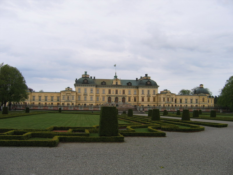 Drottningholm Palace,Stockholm, Sweden